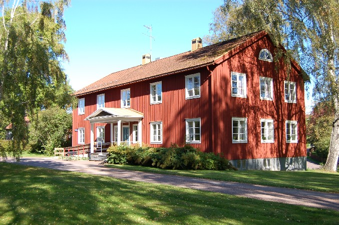 Bild på bergsmansgården